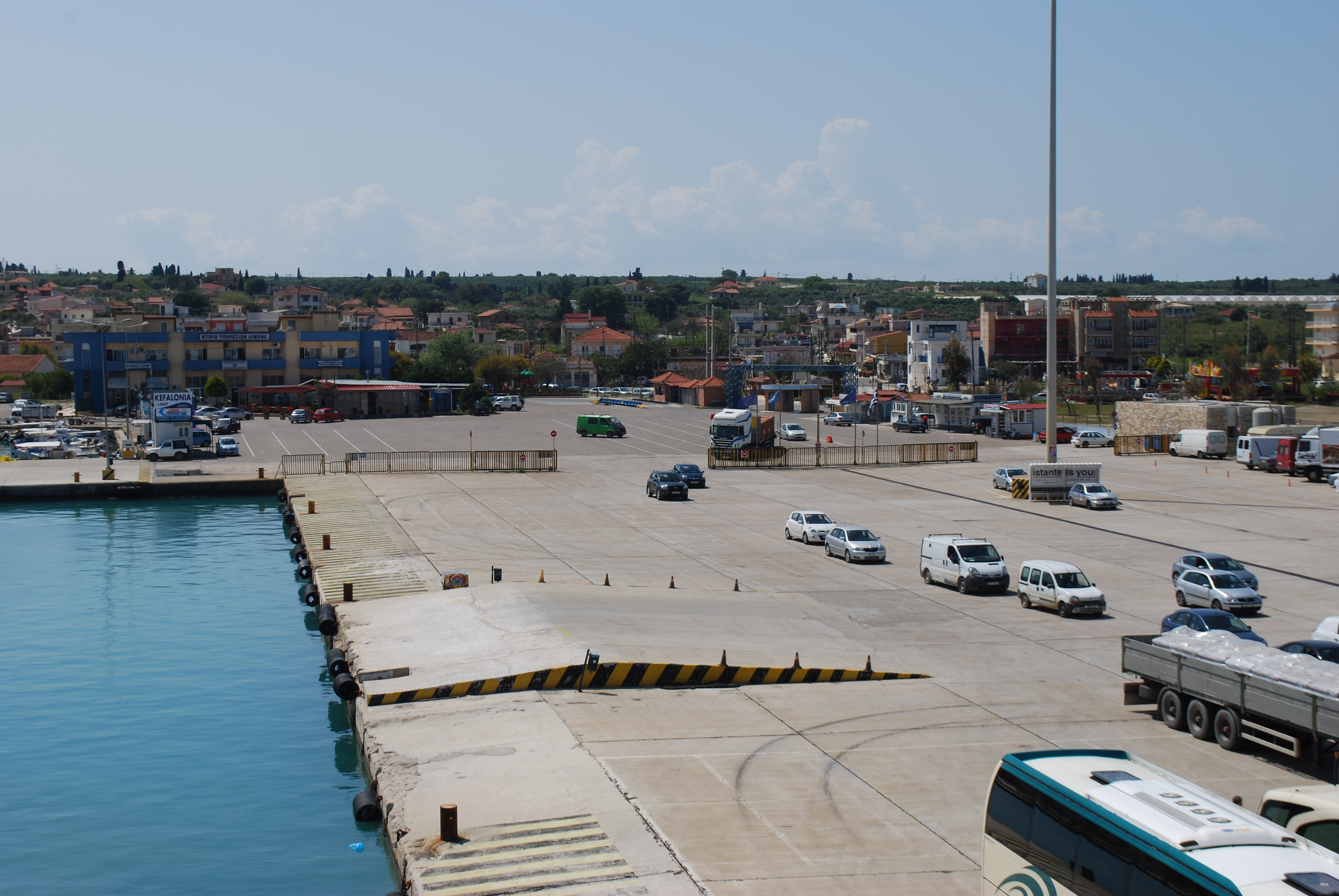 Vue du ferry "Kefalonia" sur la ligne entre Kyllini et Poros.